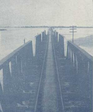 铁展 1934-1 粤汉铁路株韶段黄河桥南段